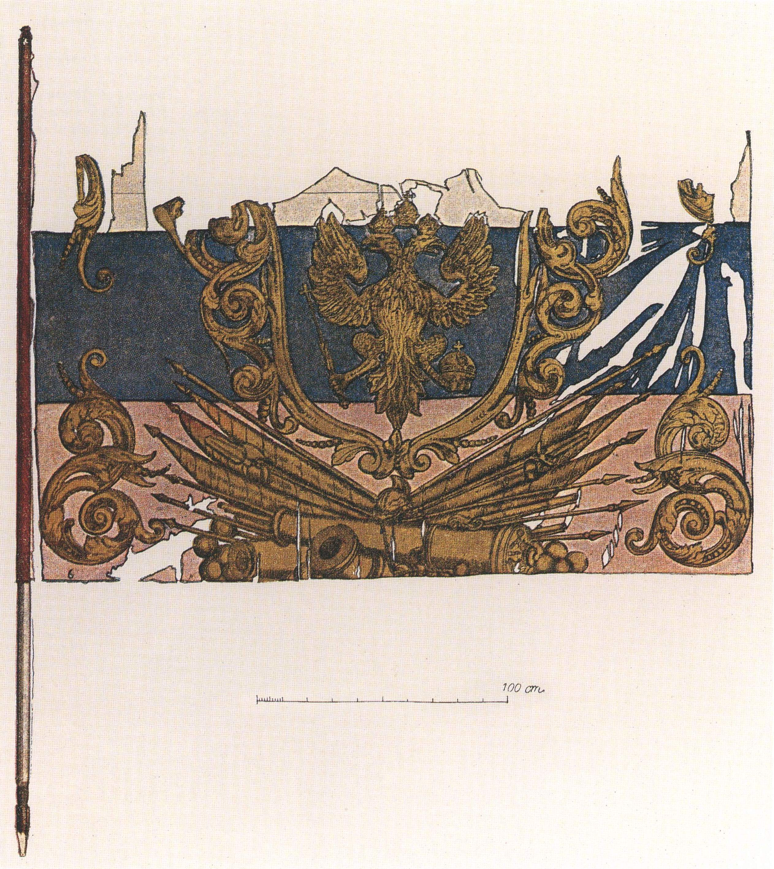 Сухопутный штандарт Петра I